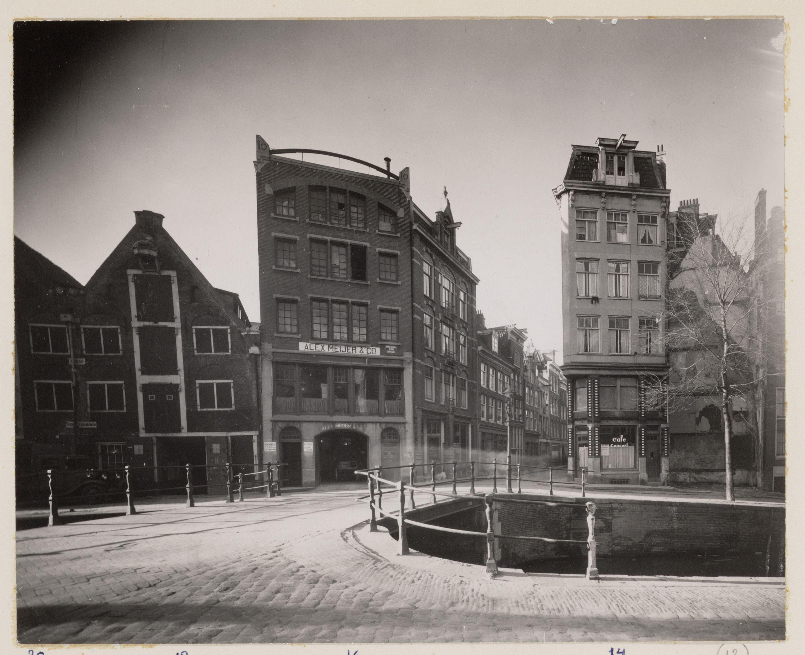 Beschrijving Krom Boomssloot 12-20 (ged.) (v.r.n.l.), gezien in westelijke richting In het midden de ingang van de Koningsstraat. Op de nummers 18-20 gebouw Schottenburgh(Ao. 1636) Documenttype foto Vervaardiger Onbekend Anoniem Collectie Archief van het Bureau Monumentenzorg: glasnegatieven en negatiefloze foto's Datering 14 januari 1946 Geografische naam Krom Boomssloot Keizersstraat Inventarissen Afbeeldingsbestand 012000006633